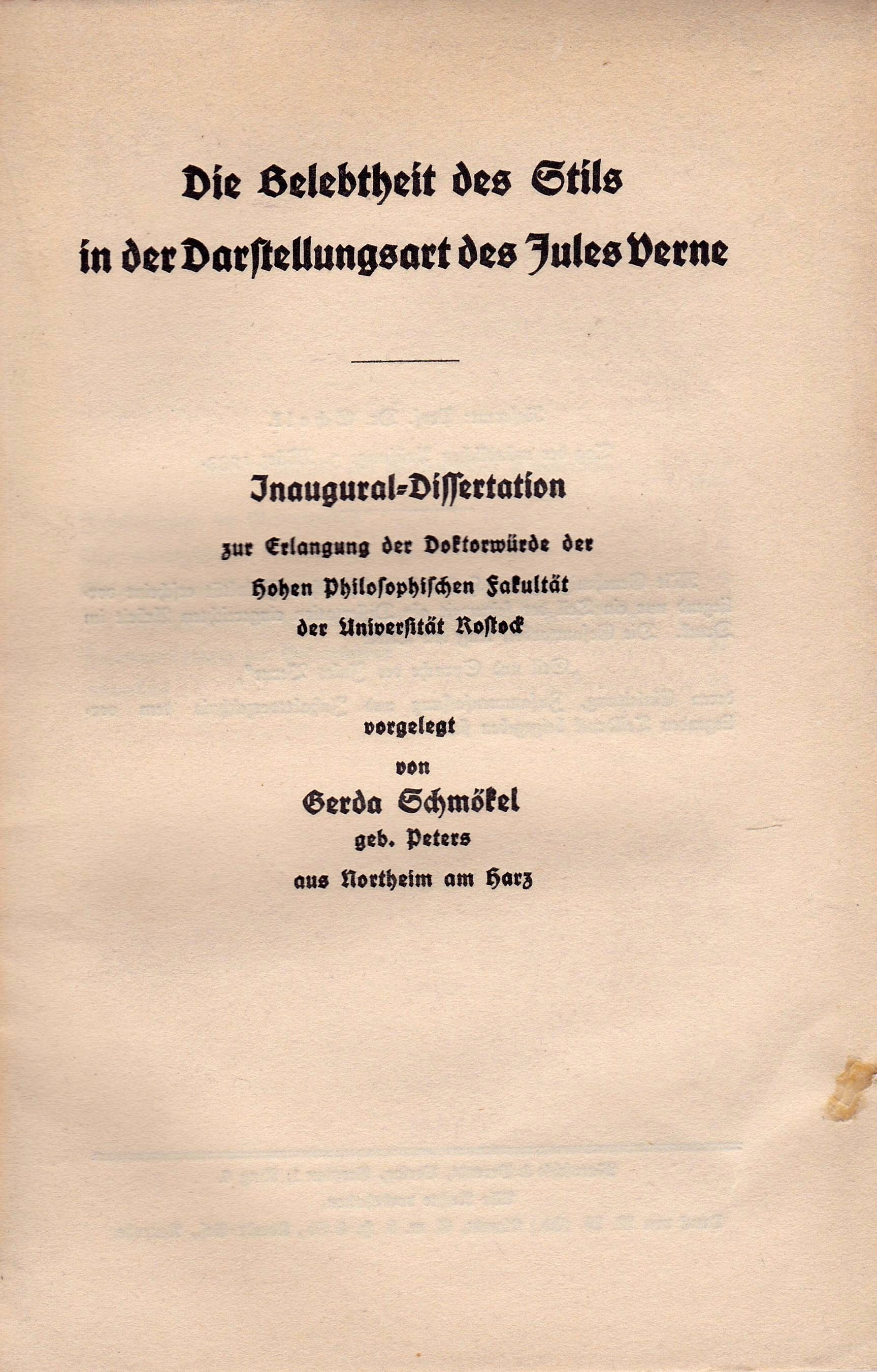 Gerda Schmökel: Die Belebtheit des Stils in der Darstellungsart des Jules Verne, Dissertation, Universität Rostock 1933